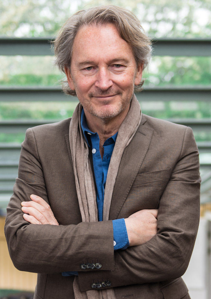 Tomas Ledin, en av artisterna för Allsång på Skansen presenteras den 10 juni 2015 på Skansen i Stockholm.